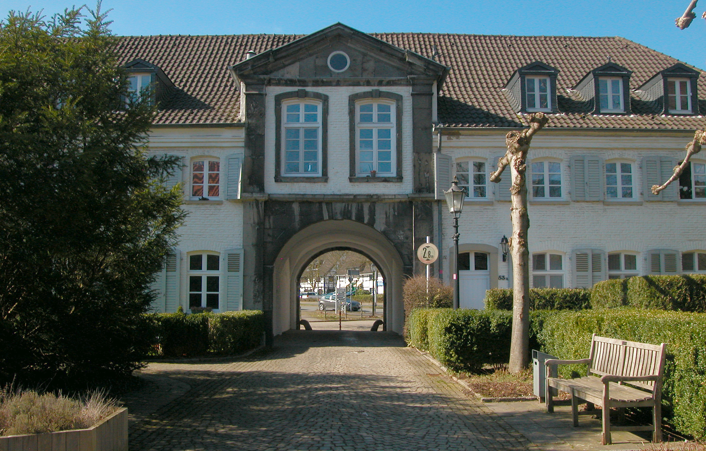 Kloster Saarn Innenhof, Blickrichtung W - Google Maps - Google Earth